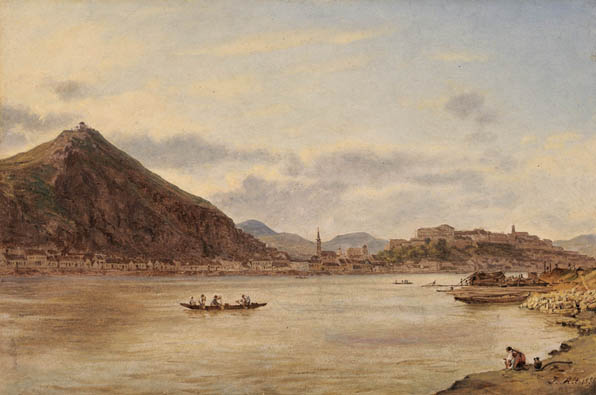 Hungarian: Buda látképe Ferencáros felől. A Gellért hegy tetején az 1849-ben elpusztult Csillagda épületével.